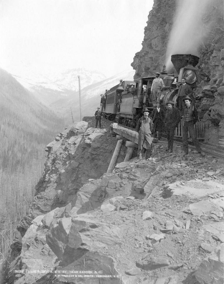 Payne Bluff above Sandon on the Kaslo and Slocan Railway (BC Archives)